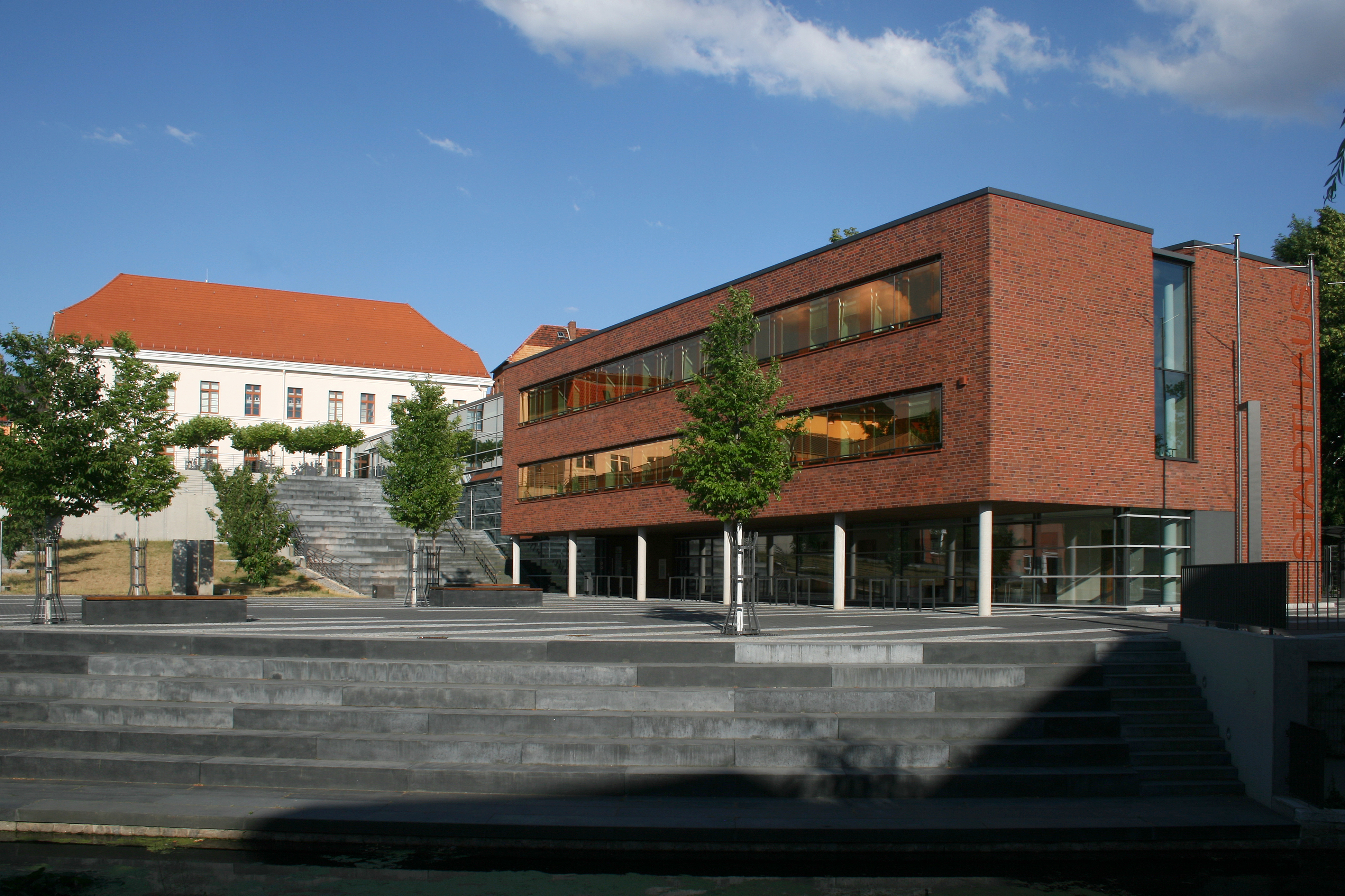 Stadthaus in Parchim (Mecklenburg-Vorpommern)